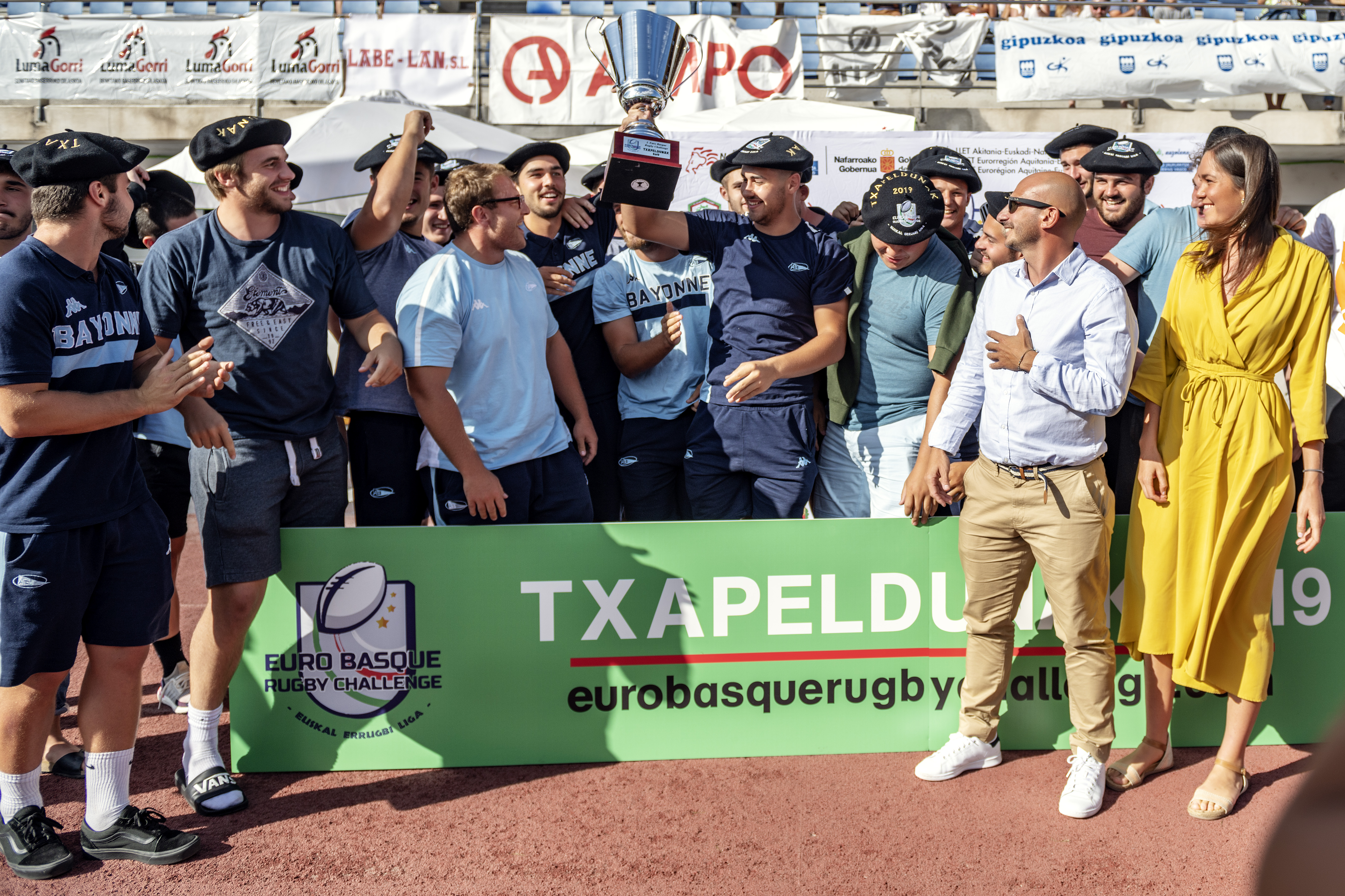 Aviron Bayonnais izan da Euro Basque Rugby Challenge-Euskal Errugbi Ligaren lehen txapelduna